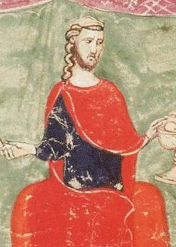 Pedro III de Aragón (1239 - 1285)